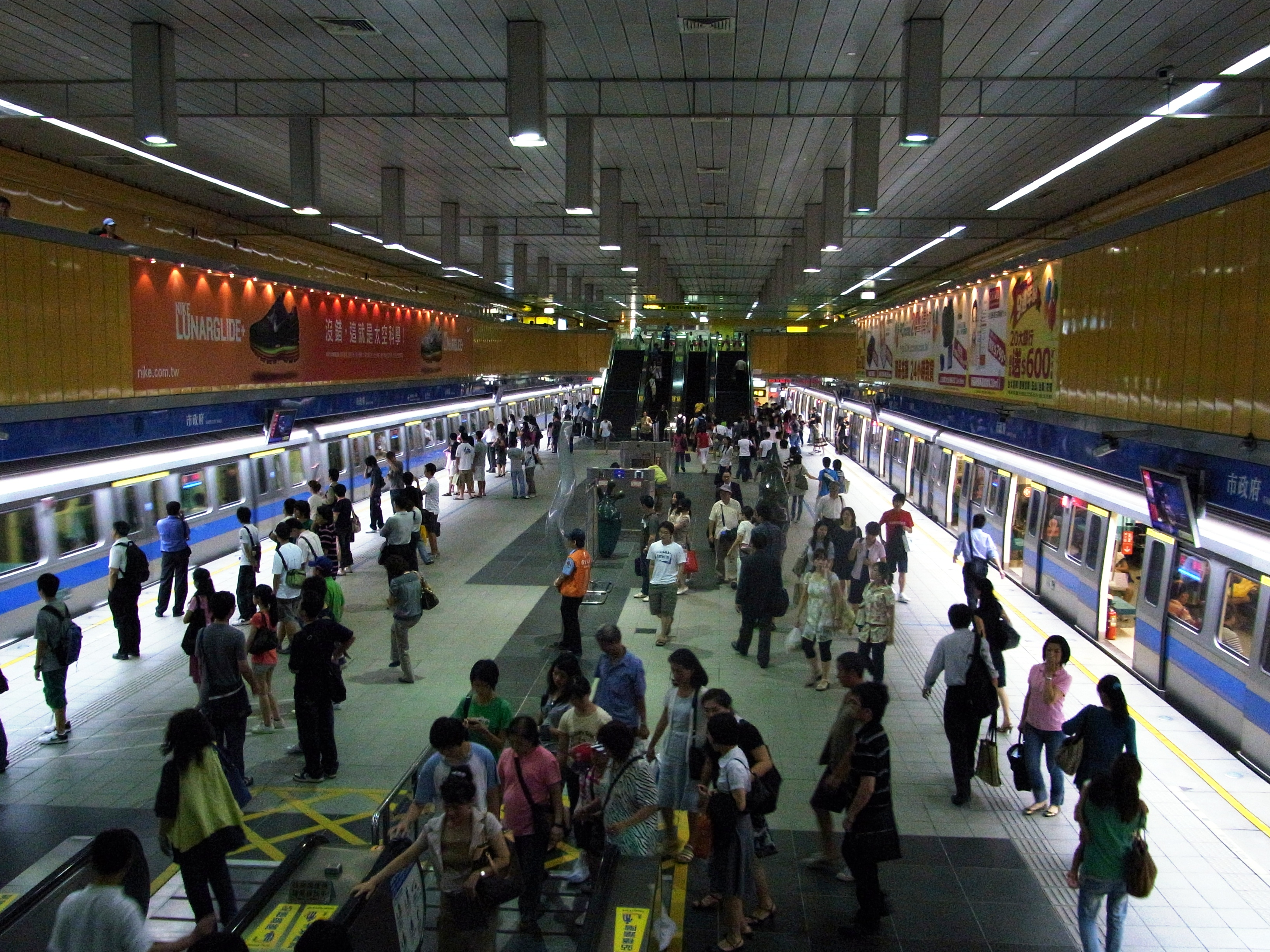 台北捷運市政府站月台層